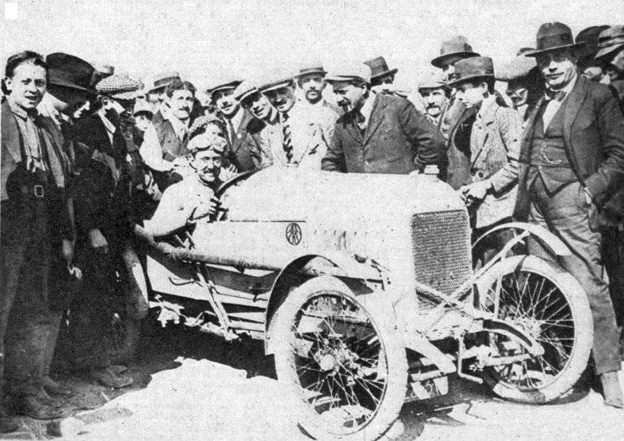 Marcel Violet, vainqueur du 2e Grand Prix de l'U.M.F. cyclecar au Mans en 1920, sur Weler Violet Major - Miroir du Sport du 2 septembre 1920, p.136